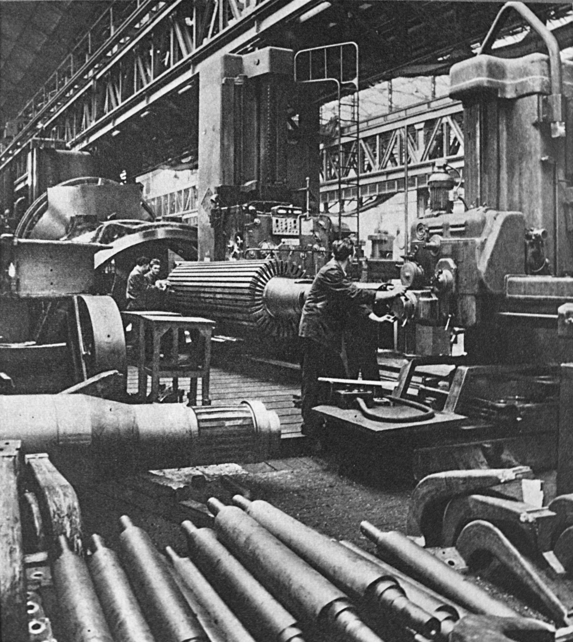 Dolnośląskie Zakłady Wytwórcze Maszyn Elektrycznych "Dolmel"